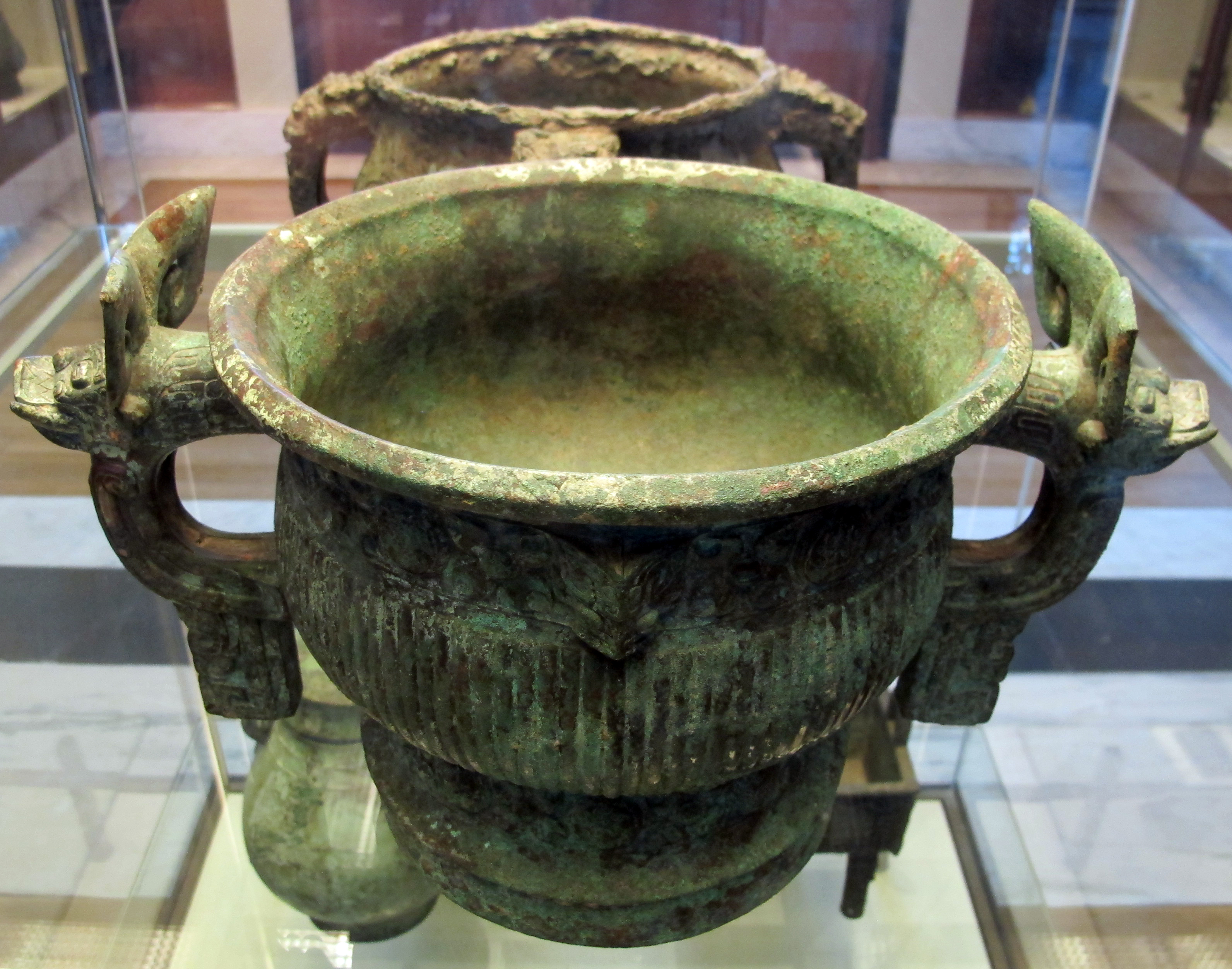 Primo periodo degli zhou dell'est, contenitore rituale in bronzo (kang hou gui), XI sec. ac.